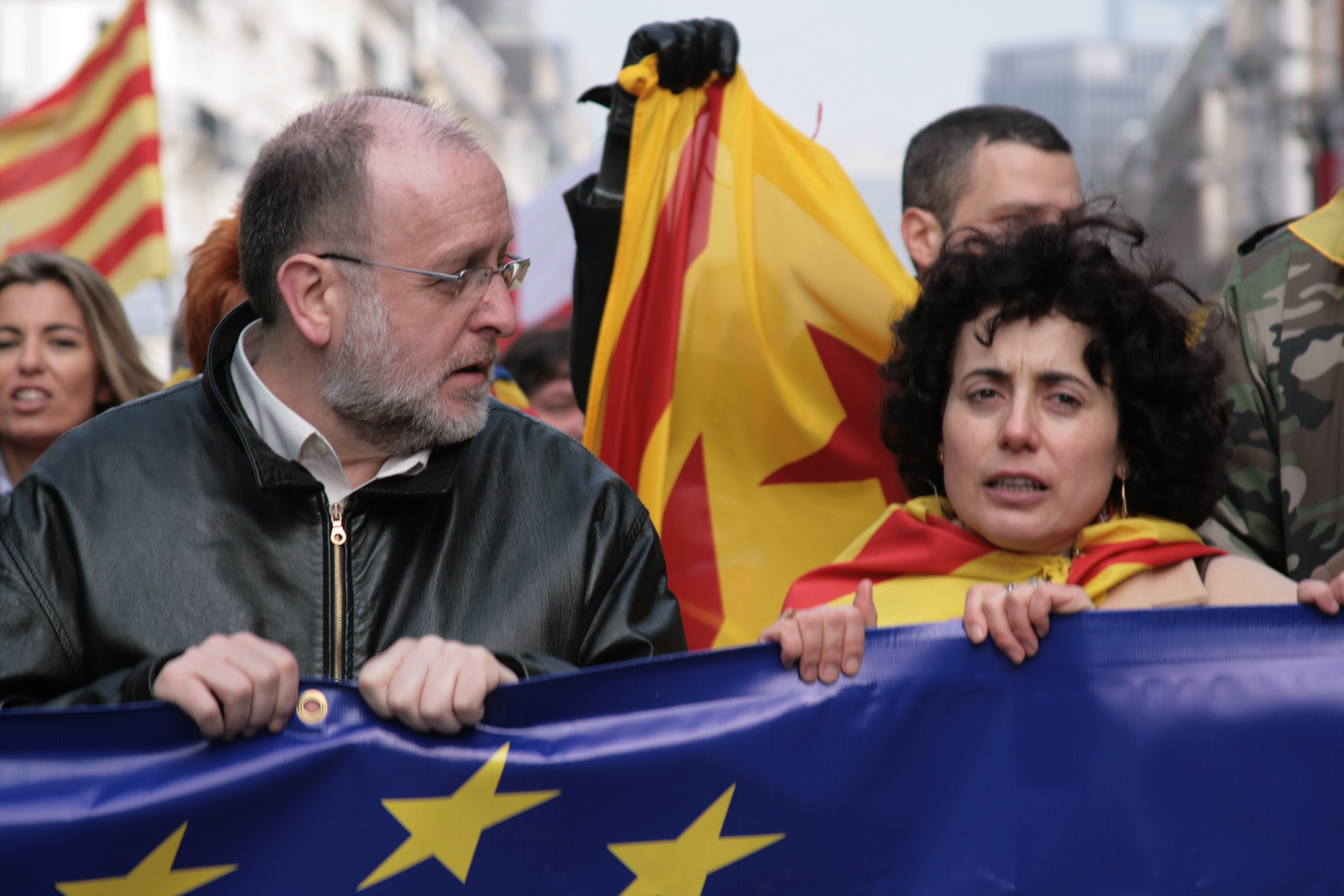 Àngel Colom i Colom a Brussel·les. Al seu costat, Èrika Casajoana; i al fons a l'esquerre, Anna Arqué